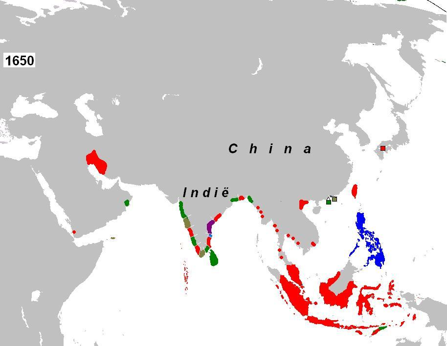 Kolonisasies van Asië in 1650